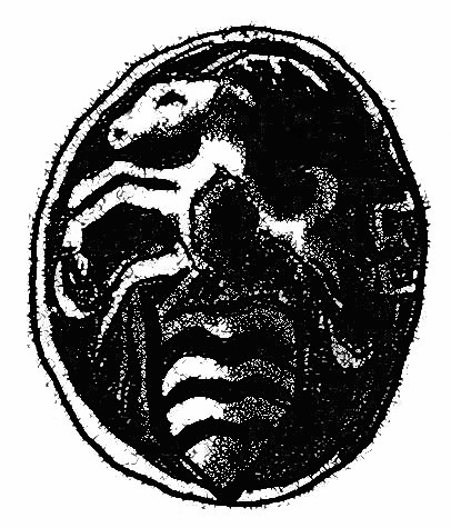 tegnet etter et segl fra 1615